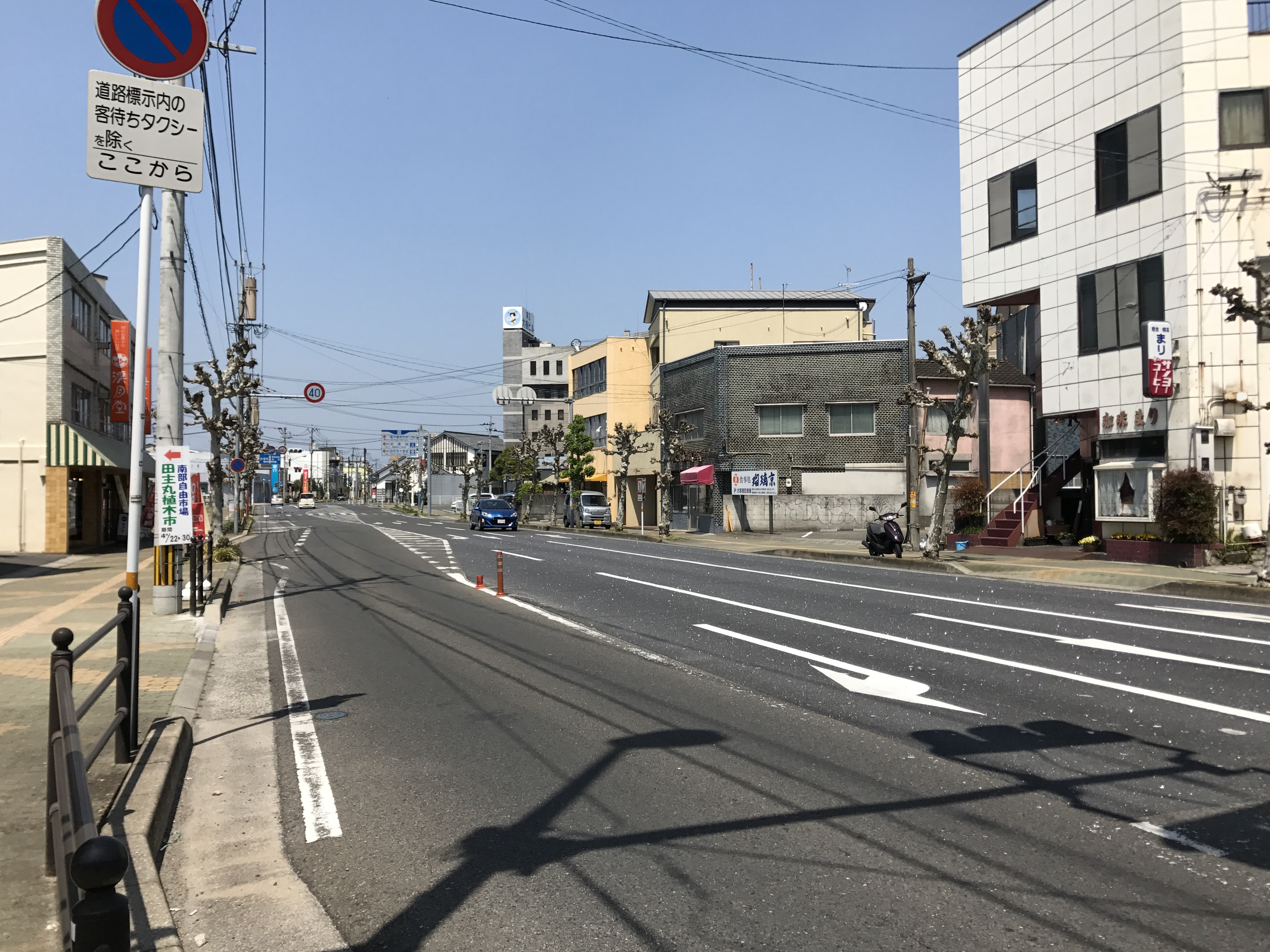 中津駅西側の大分県道23号